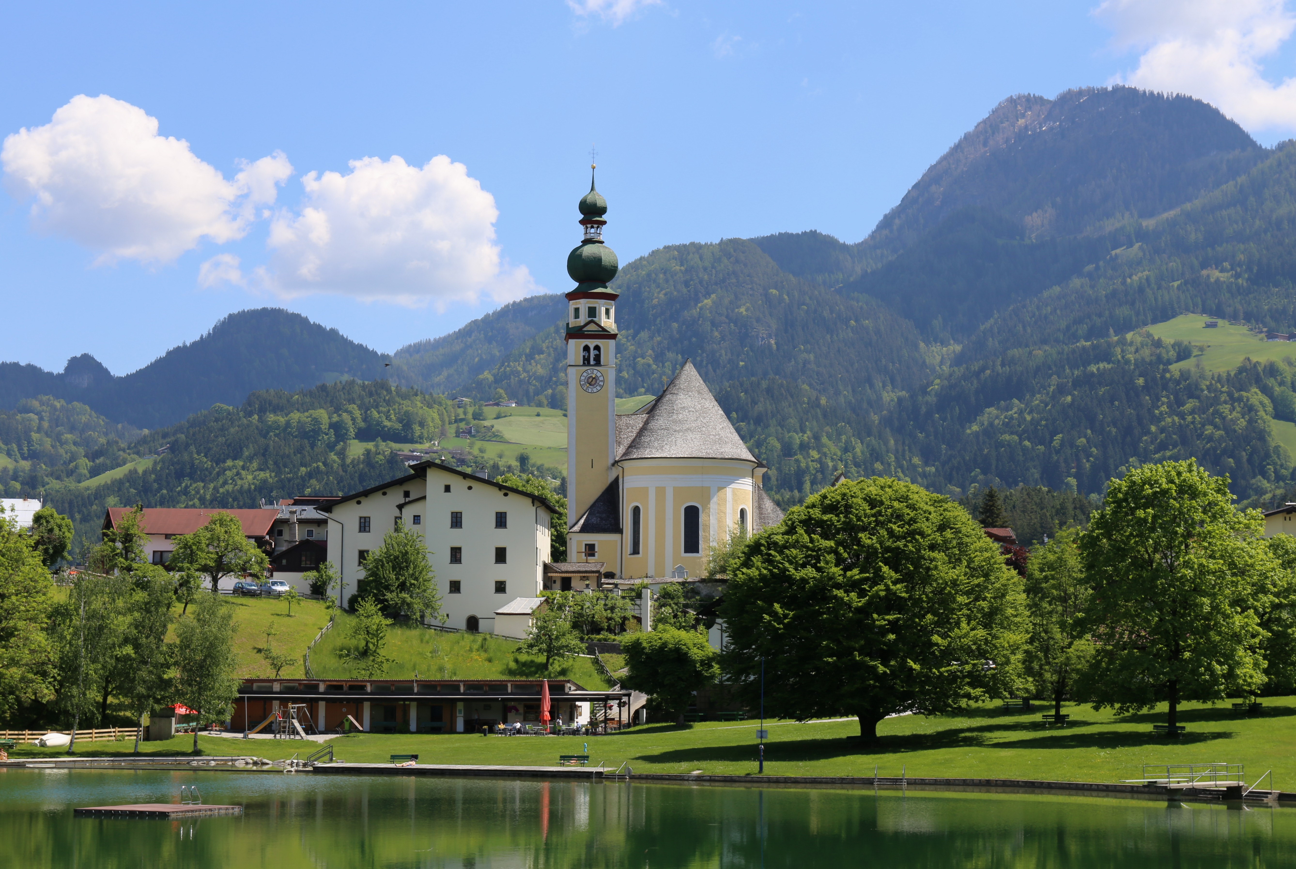 Reither See; im Hintergrund Kath. Pfarrkirche hl. Petrus, Reith im Alpbachtal; mächtiger klassizistischer Saalbau. Urkundlich Pfarre 1187. Kirchenneubau 1801 bis 1805 This media shows the remarkable cultural object in the Austrian state of Tyrol listed by the Tyrolean Art Cadastre with the ID 3503. (on tirisMaps, pdf, more images on Commons, Wikidata)